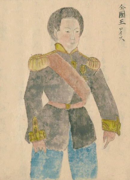 ルイス1世 (ポルトガル王) 高嶋祐啓『欧西行紀』